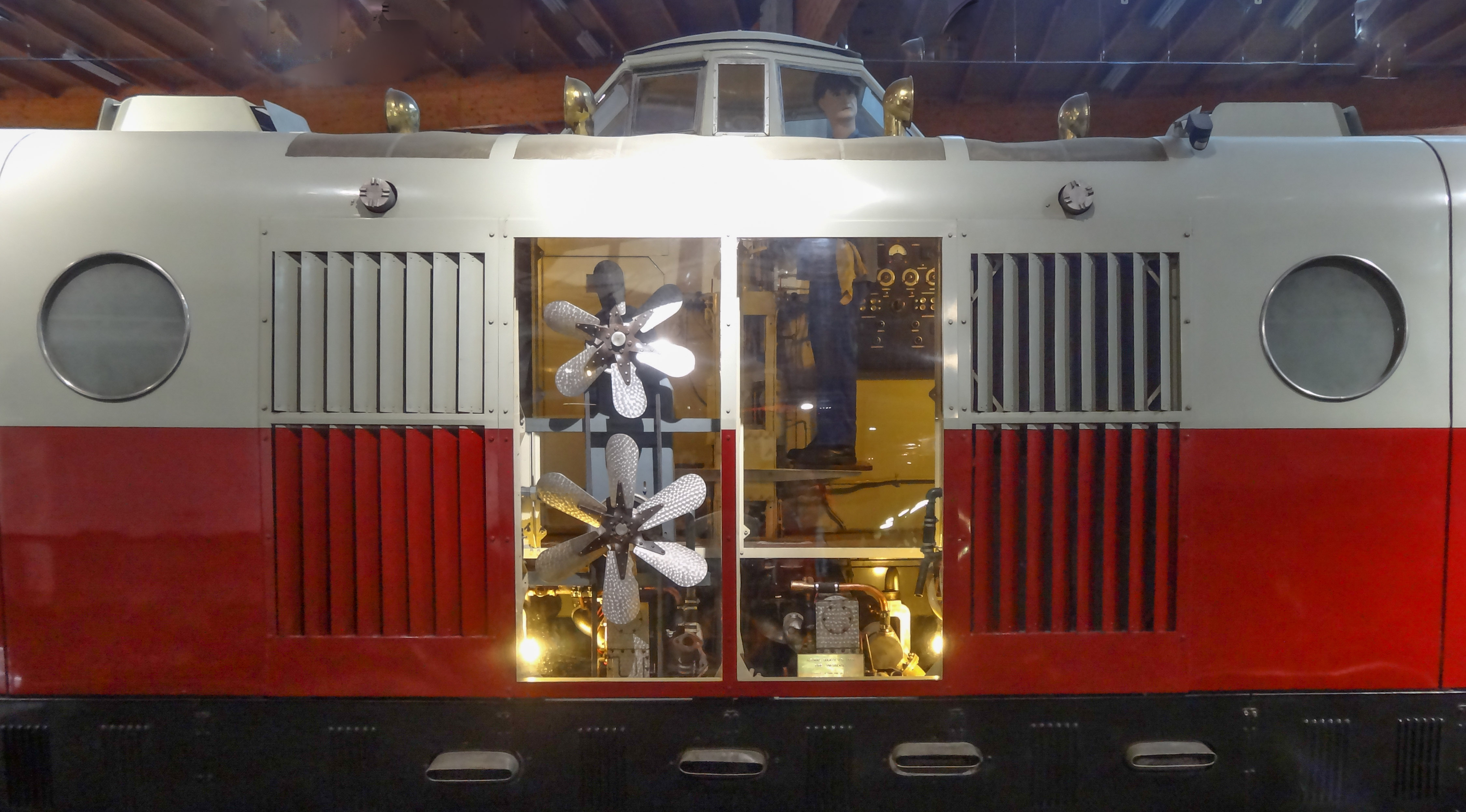 Vue du poste de conduite de l'autorail Bugatti